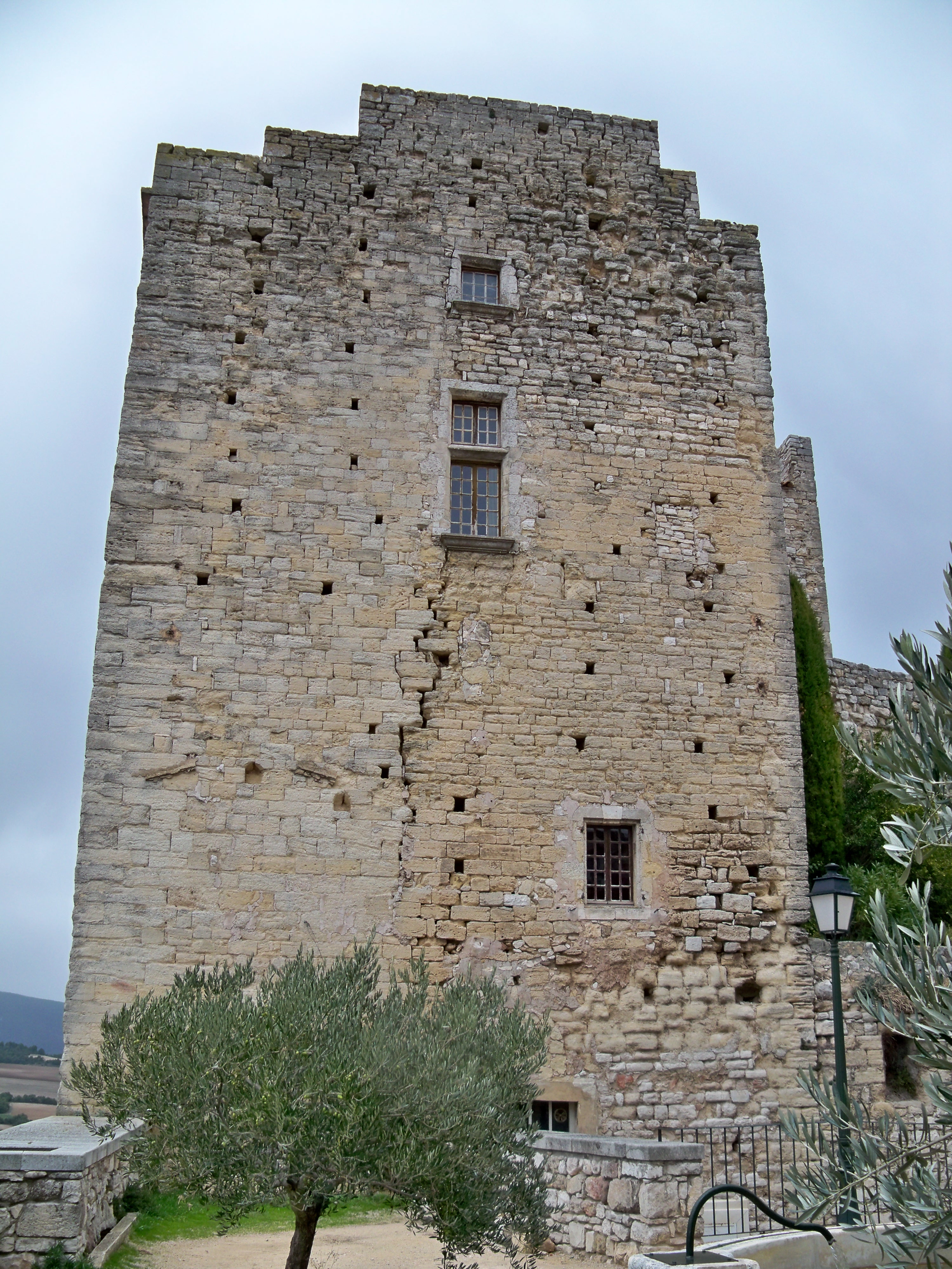 Chateau de Caseneuve, Vaucluse, France